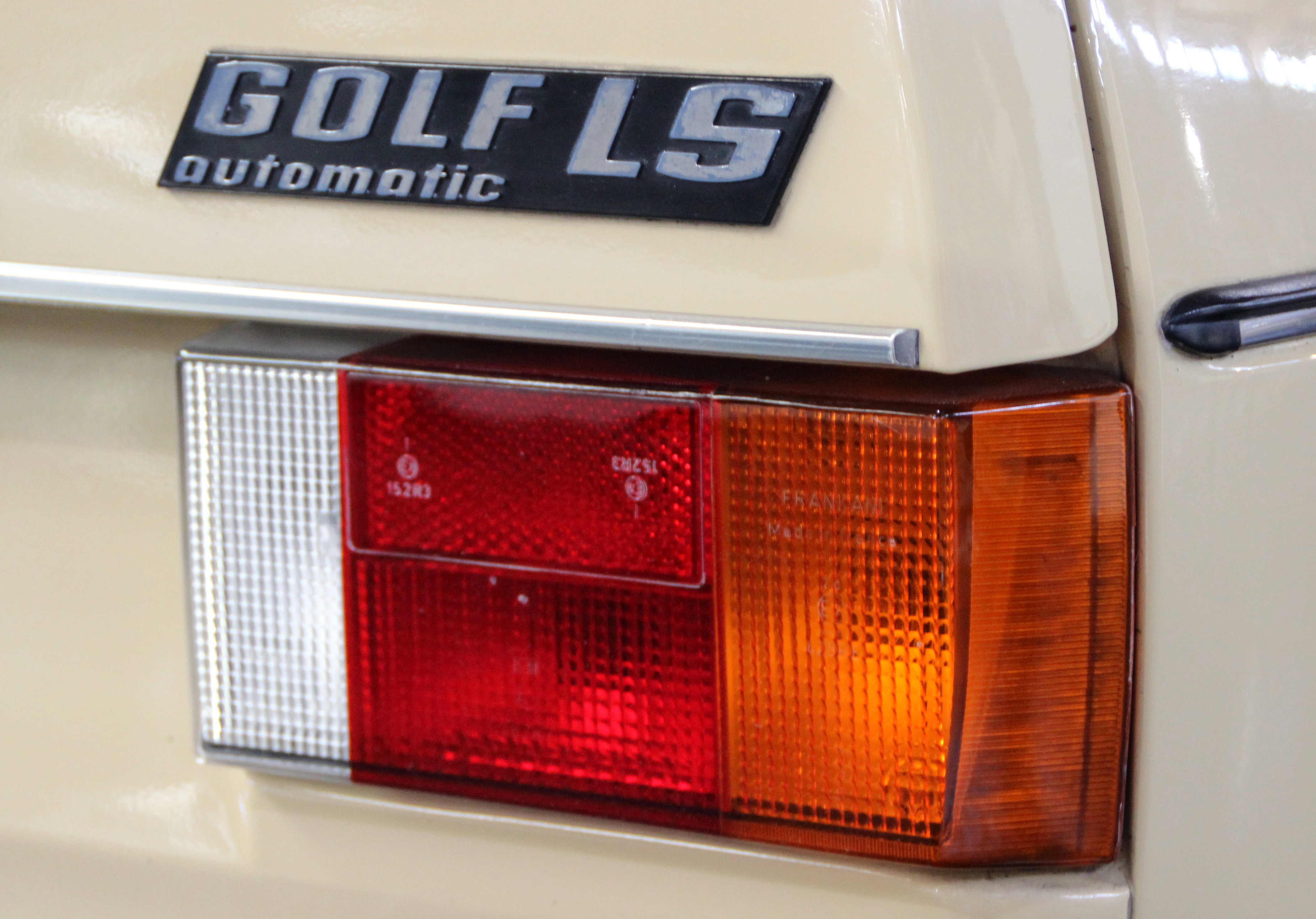 Heckleuchgte eines GOLF I LS